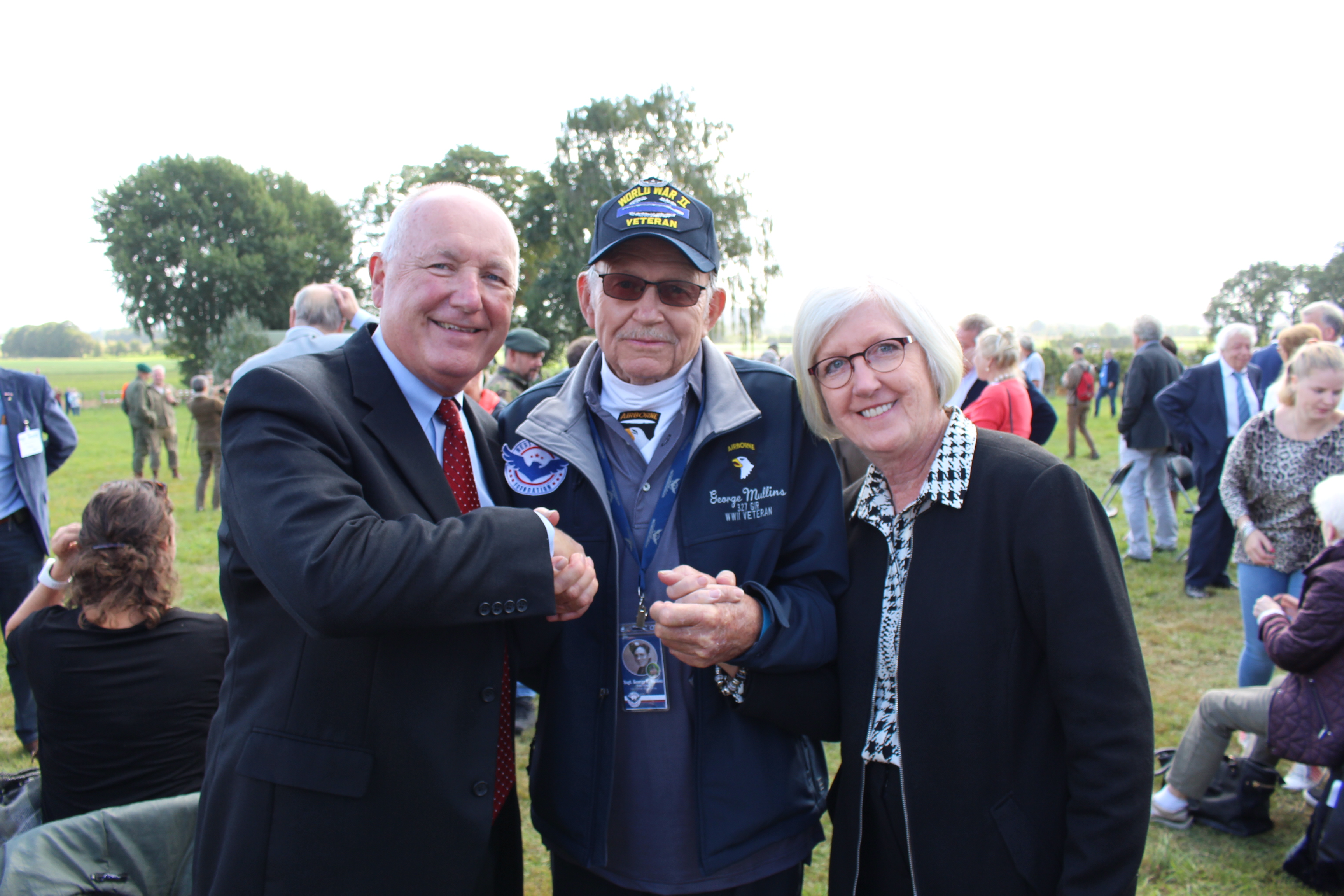 Spetember 18, 2019